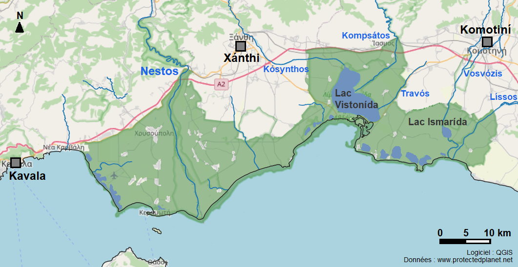 Emprise du parc national de Macédoine-Orientale et Thrace en vert, légende des villes environnantes et des cours d'eau. UNEP-WCMC and IUCN (2020), Protected Planet: Ethniko Parko Anatolikis Makedonias Kai Thrakis in Greece ; The World Database on Protected Areas (WDPA)/The Global Database on Protected Areas Management Effectiveness (GD-PAME) [On-line], Cambridge, UK. Data provided by the European Environment Agency (EEA). Available at: Basemap: OpenStreetMap. Free software: QGIS. Creation: Iolchos07.